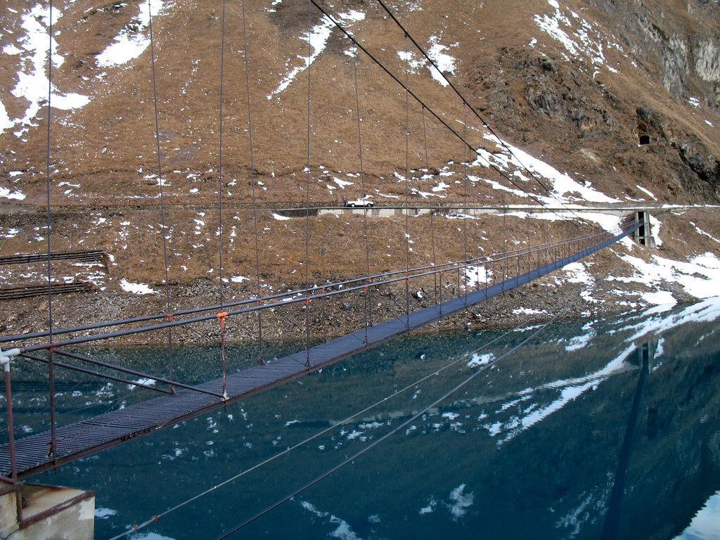 Passerella sul Lago di Morasco, Formazza, Italy